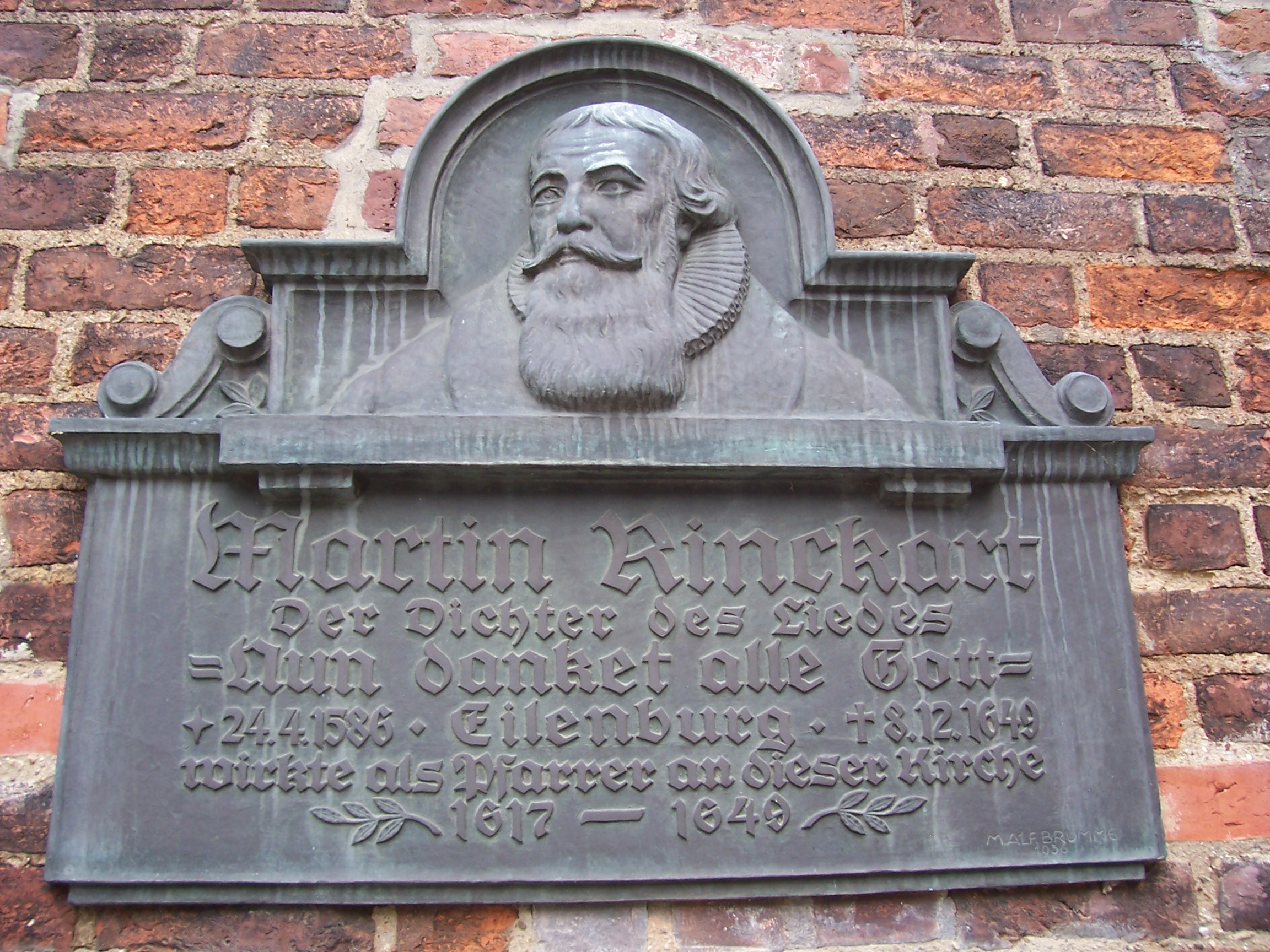 Tafel an der Nikolaikirche in Eilenburg zu Ehren Martin Rinckarts